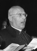 Jäger, Lorenz Dr.: Erzbischof von Paderborn, Kardinal, Bundesrepublik Deutschland (PND 118711334)